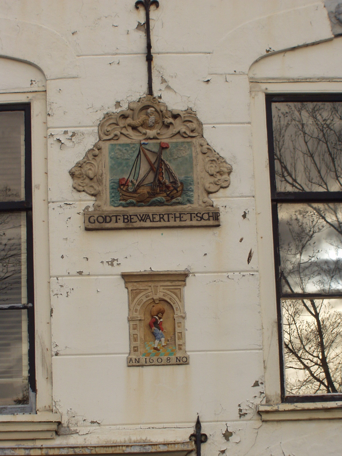 Gevelsteen (Gablestone), Houtmarkt (Woodmarket), Haarlem, Netherlands